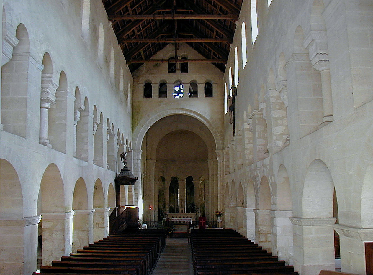 Vignory - Eglise Saint-Etienne - Nef, arc diaphragme